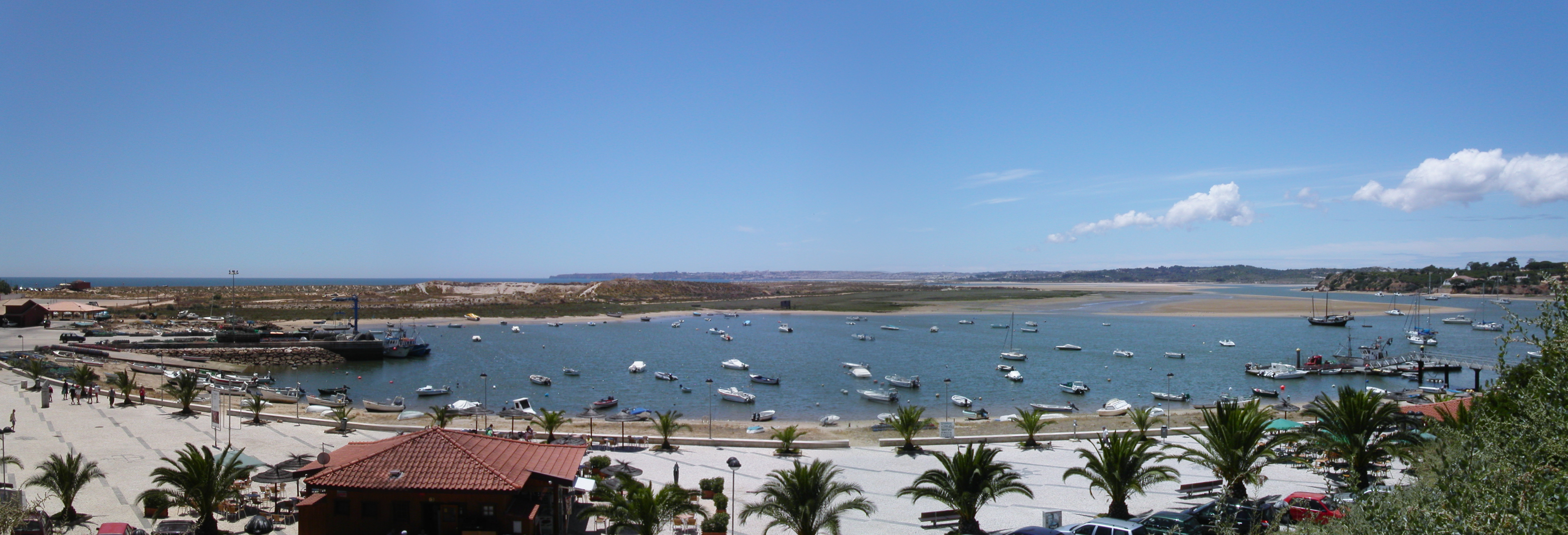 Port of Alvor, Portugal